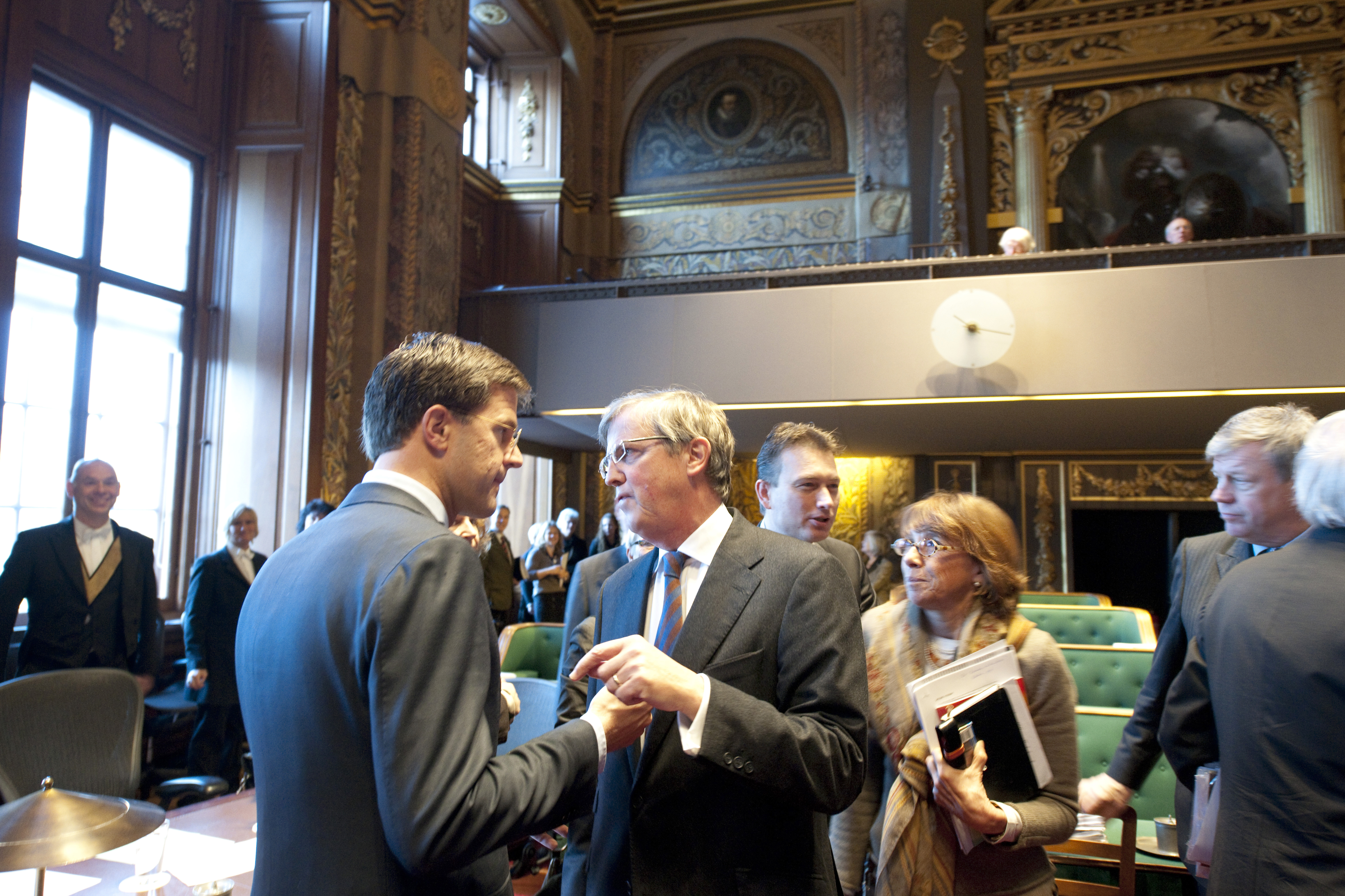 Minister-president Rutte in gesprek met VVD-senator Loek Hermans voorafgaand aan het debat met de Eerste Kamer over de regeringsverklaring.